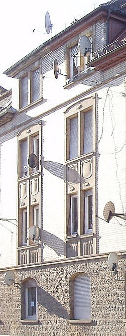 Ausschnitt aus unten genannter Quelle